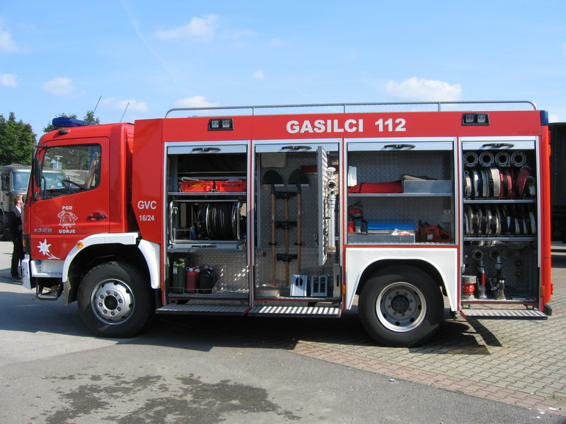 Fire engine in Slovenia